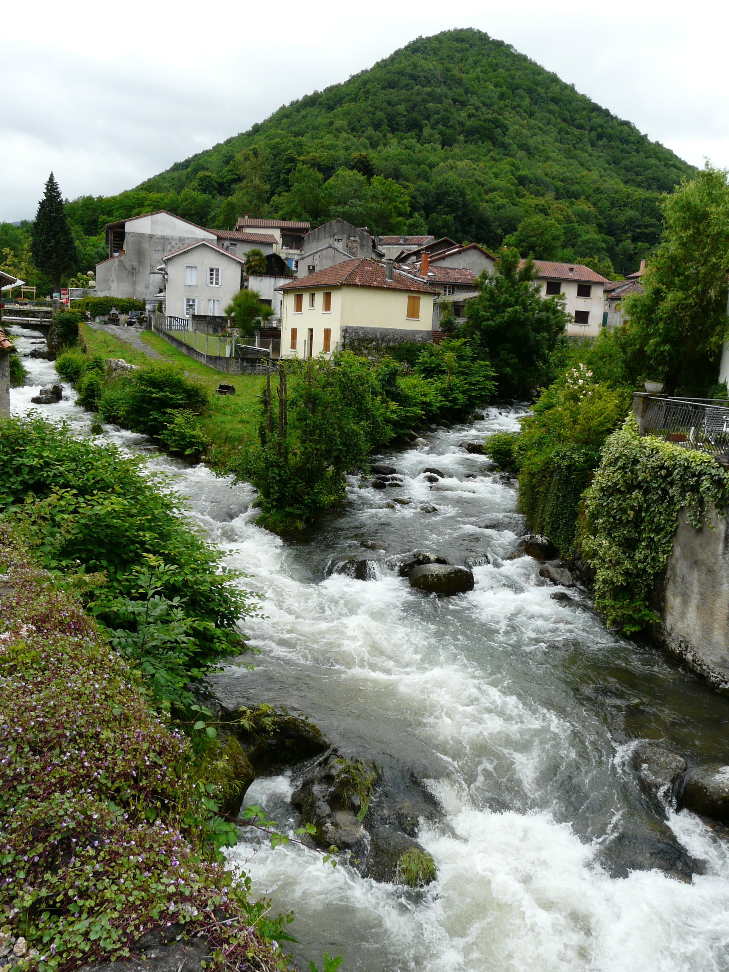 L'Ourse de Sost (à gauche) conflue avec l'Ourse de Ferrère pour former l'Ourse, Mauléon-Barousse, Hautes-Pyrénées, France.